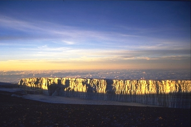 Sunrise at Gillman Point - Kilimanjaro National Park - Tanzania